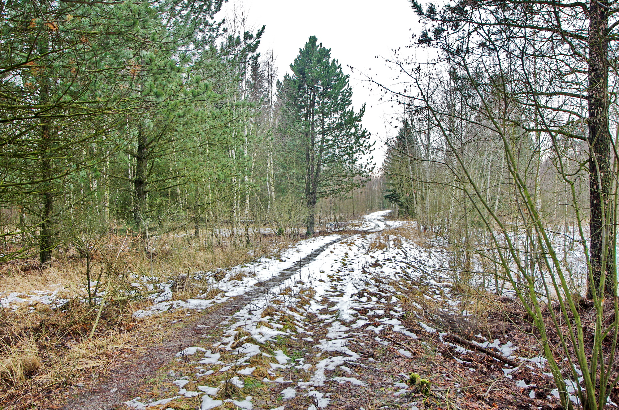 Výsypka Antonín - arboretum, západně od Sokolova